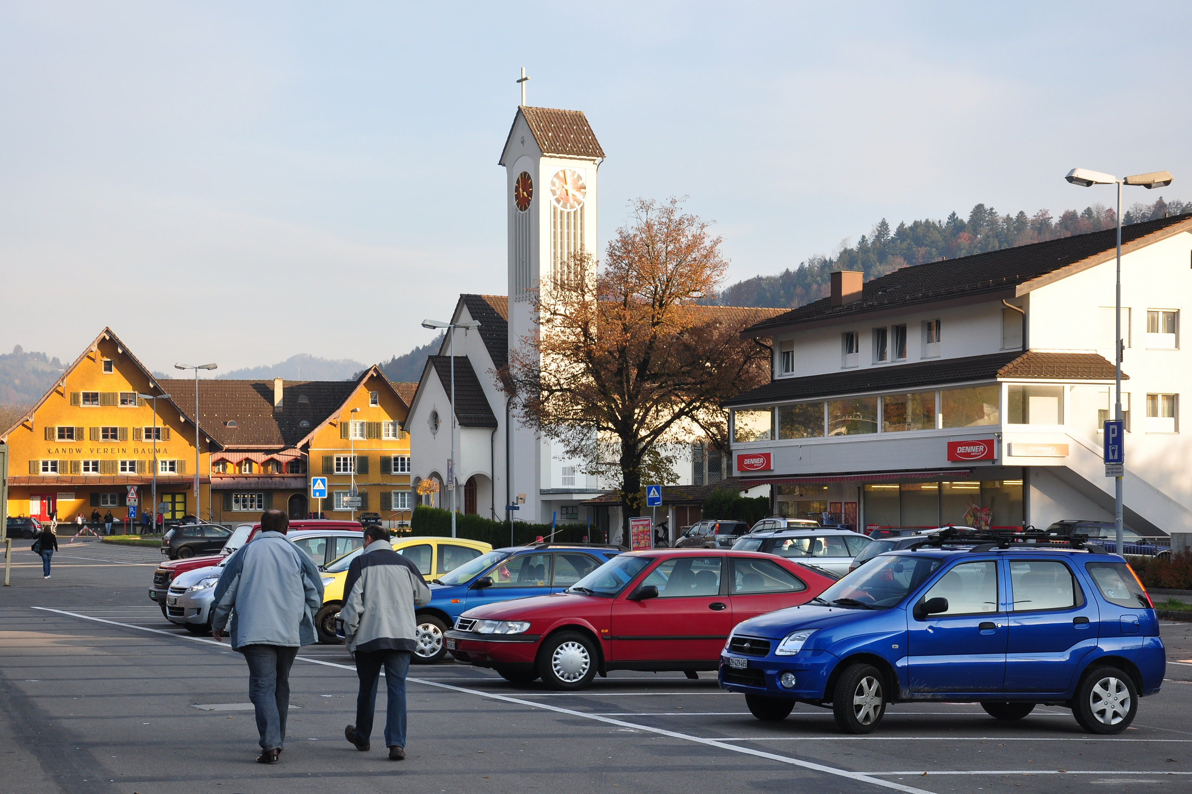 Bauma (Switzerland)